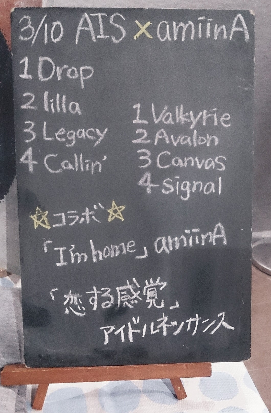 amiinAセトリボード(20180311(1))